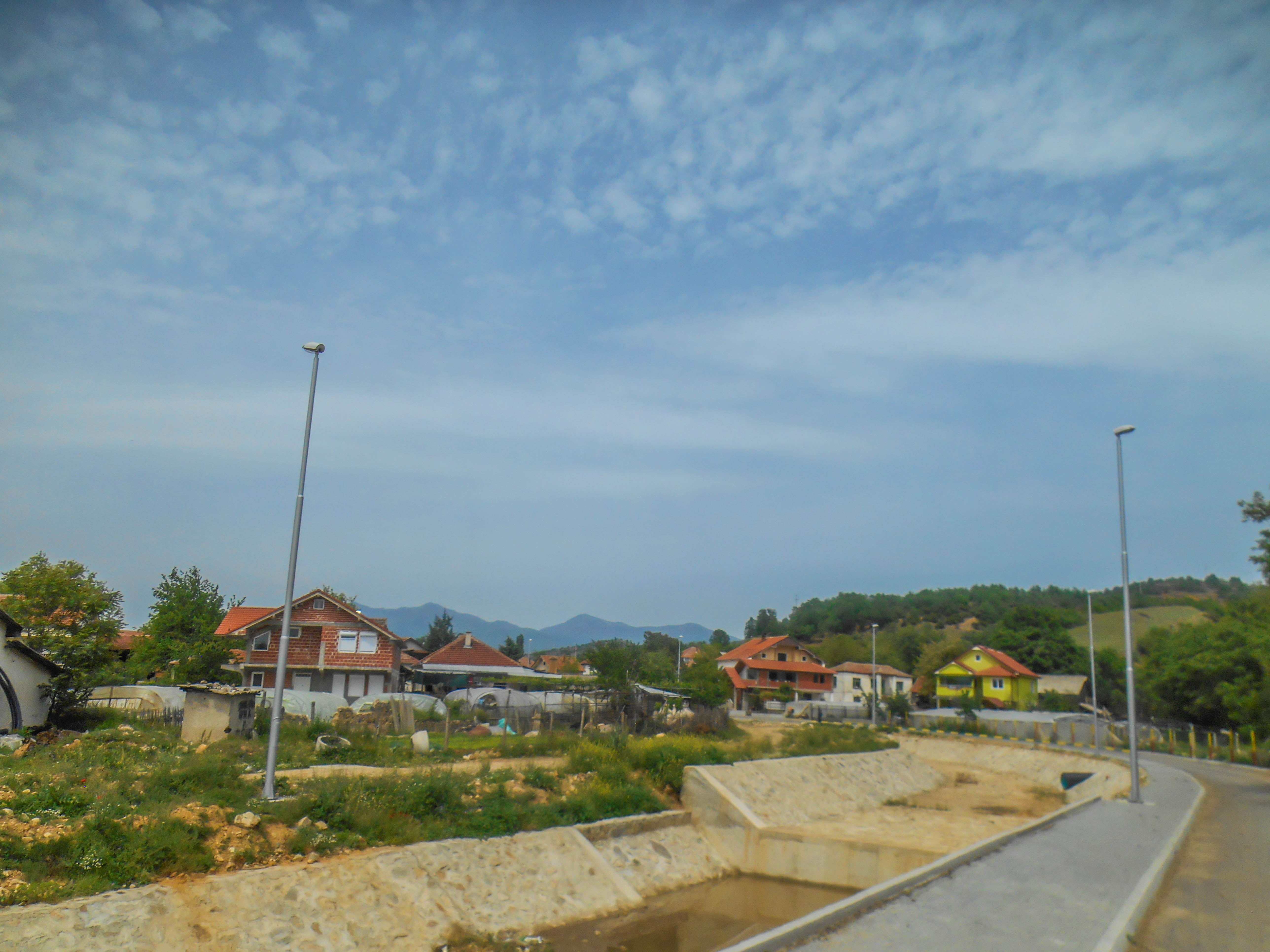 Сушево